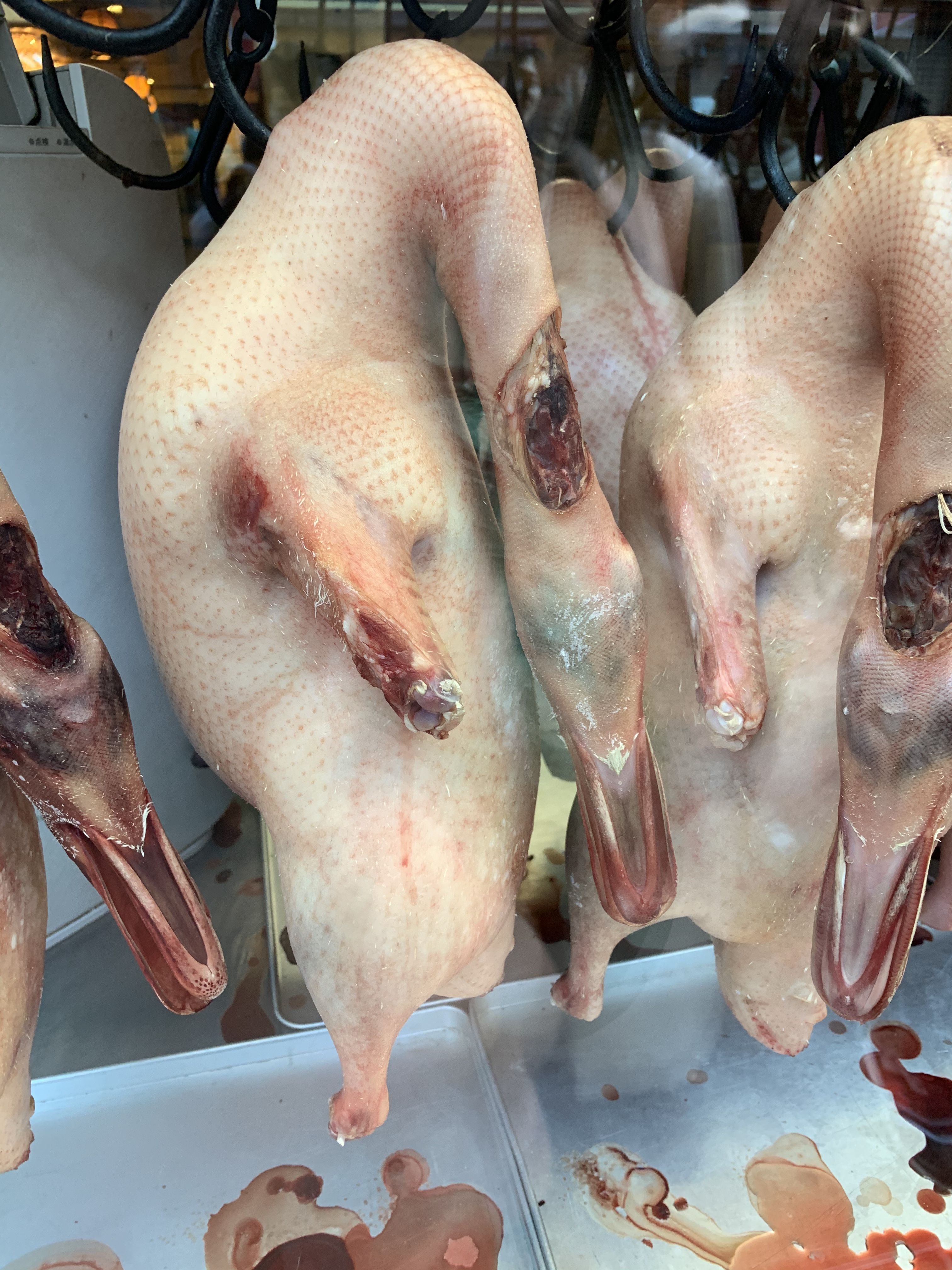 下処理中の北京ダック（横浜中華街にて撮影）